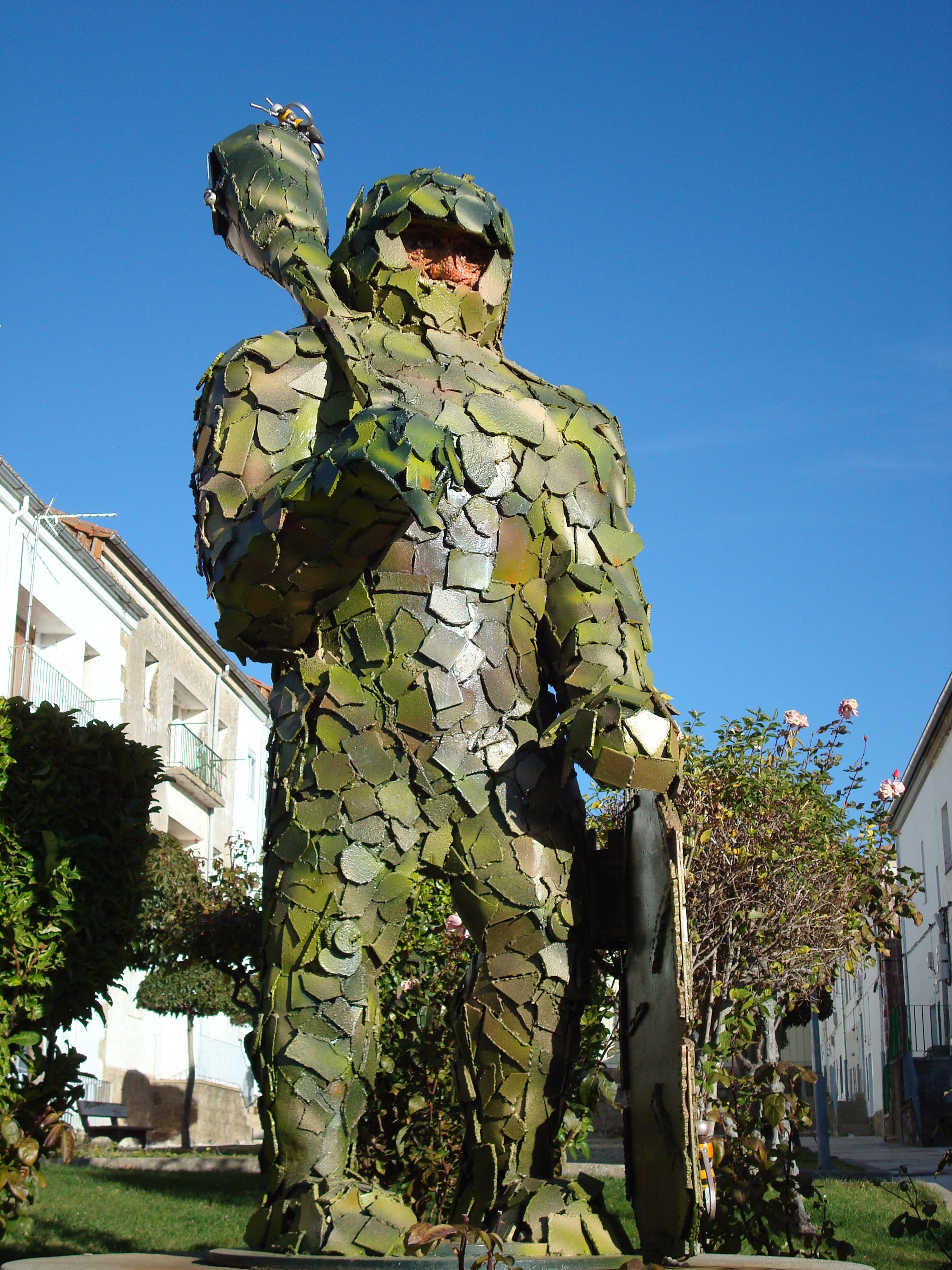 Bejar - 033